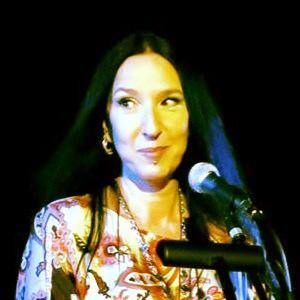 in concerto